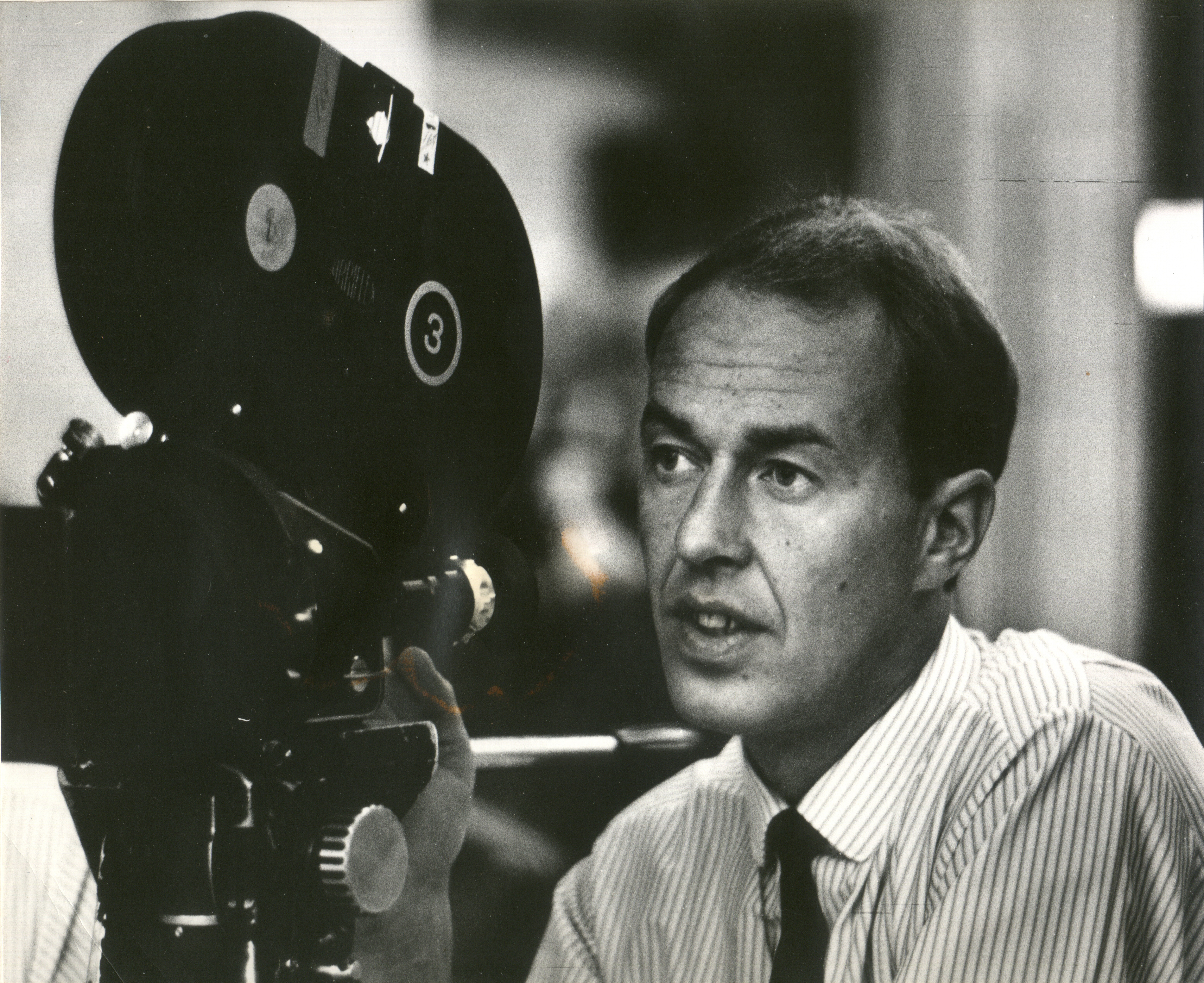 Foto: Stein Thue, fra innspillingen av "Hennes meget kongelig høyhet"